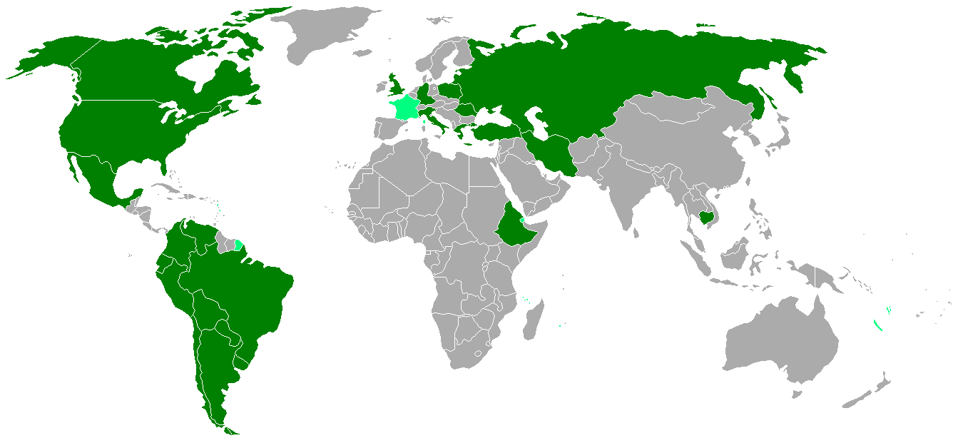 Carte des visites d'État du général de Gaulle lors de sa présidence, de 1959 à 1969 (